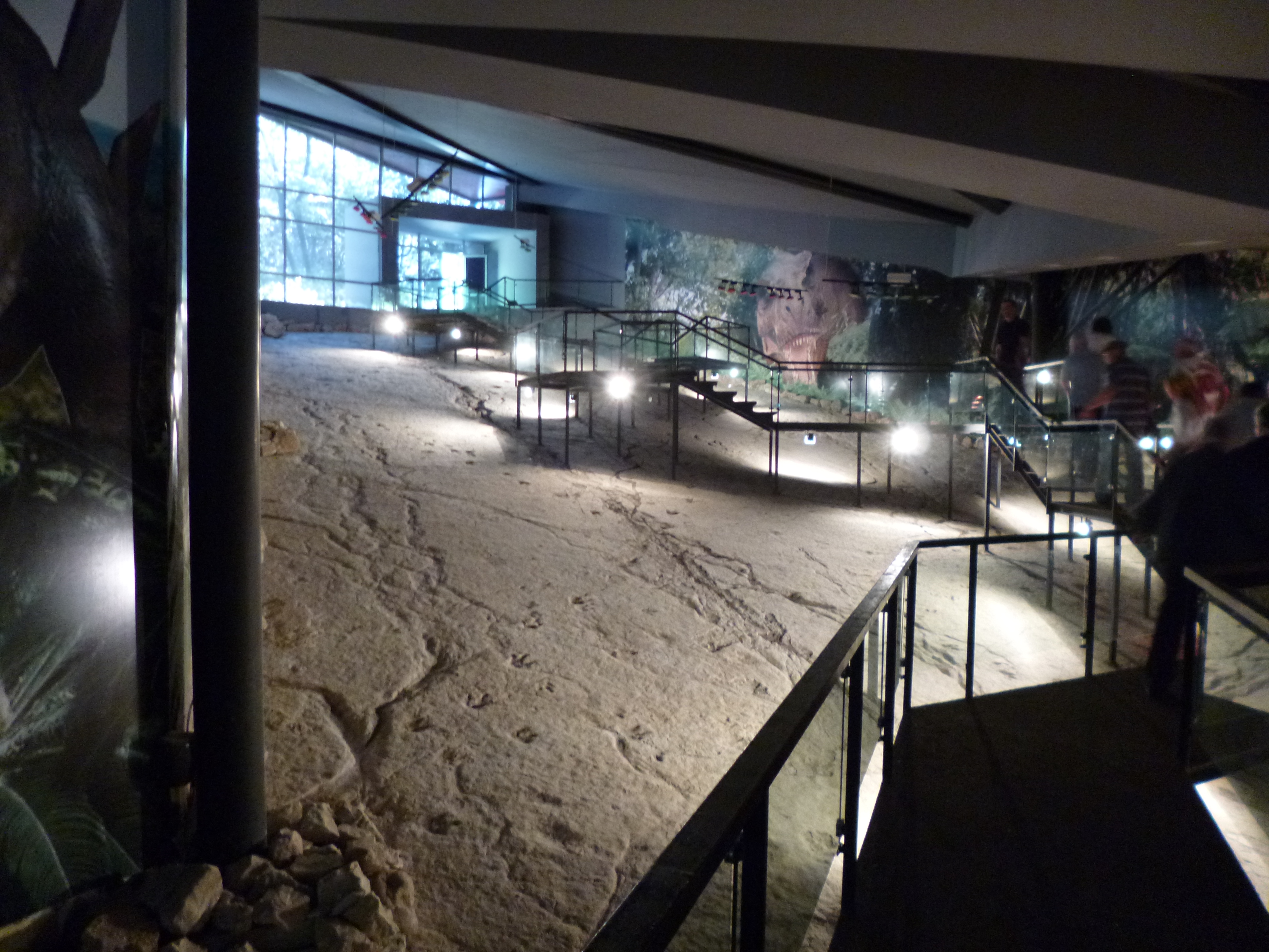 P1000718 Sataplia